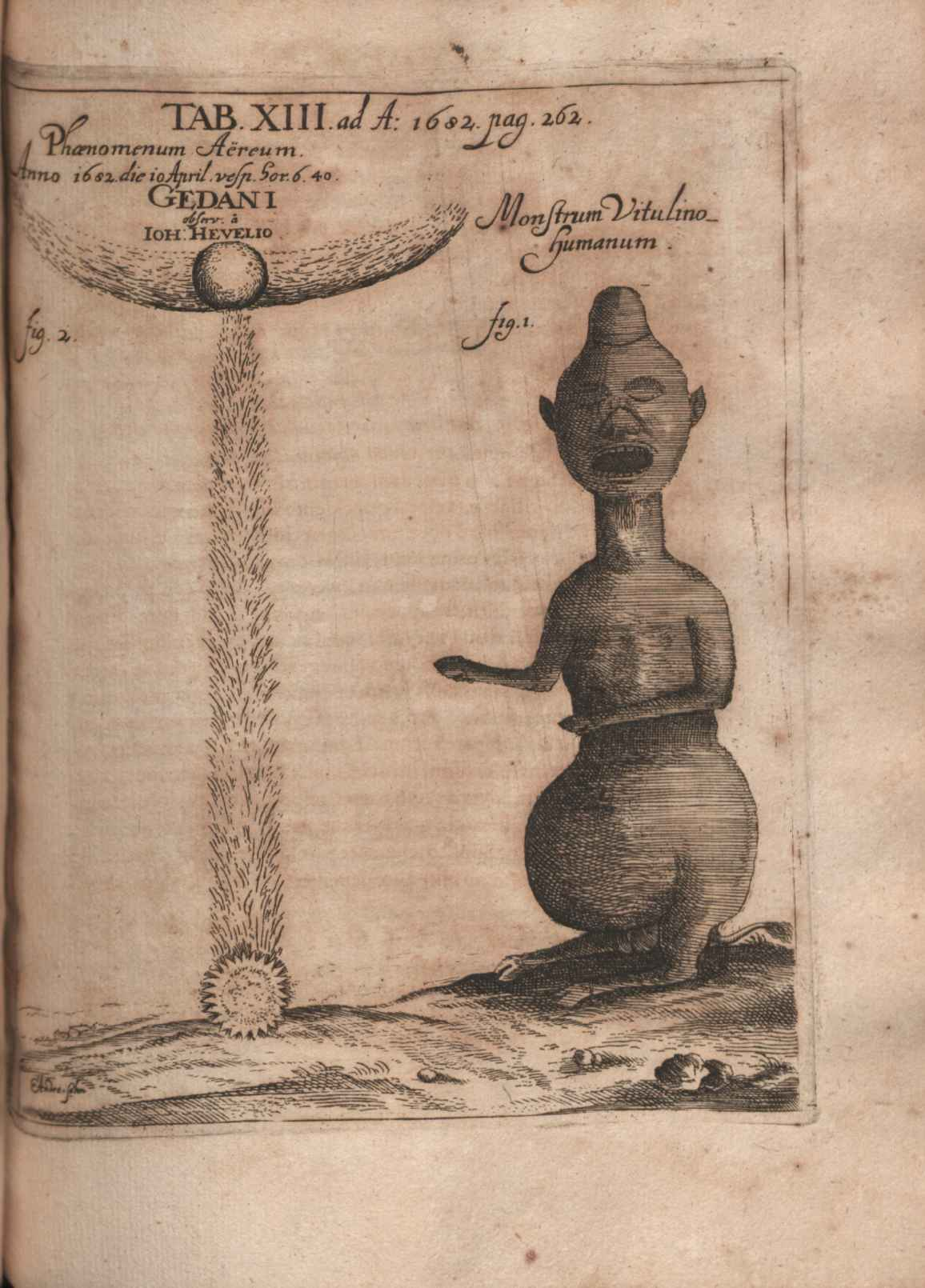 Illustration